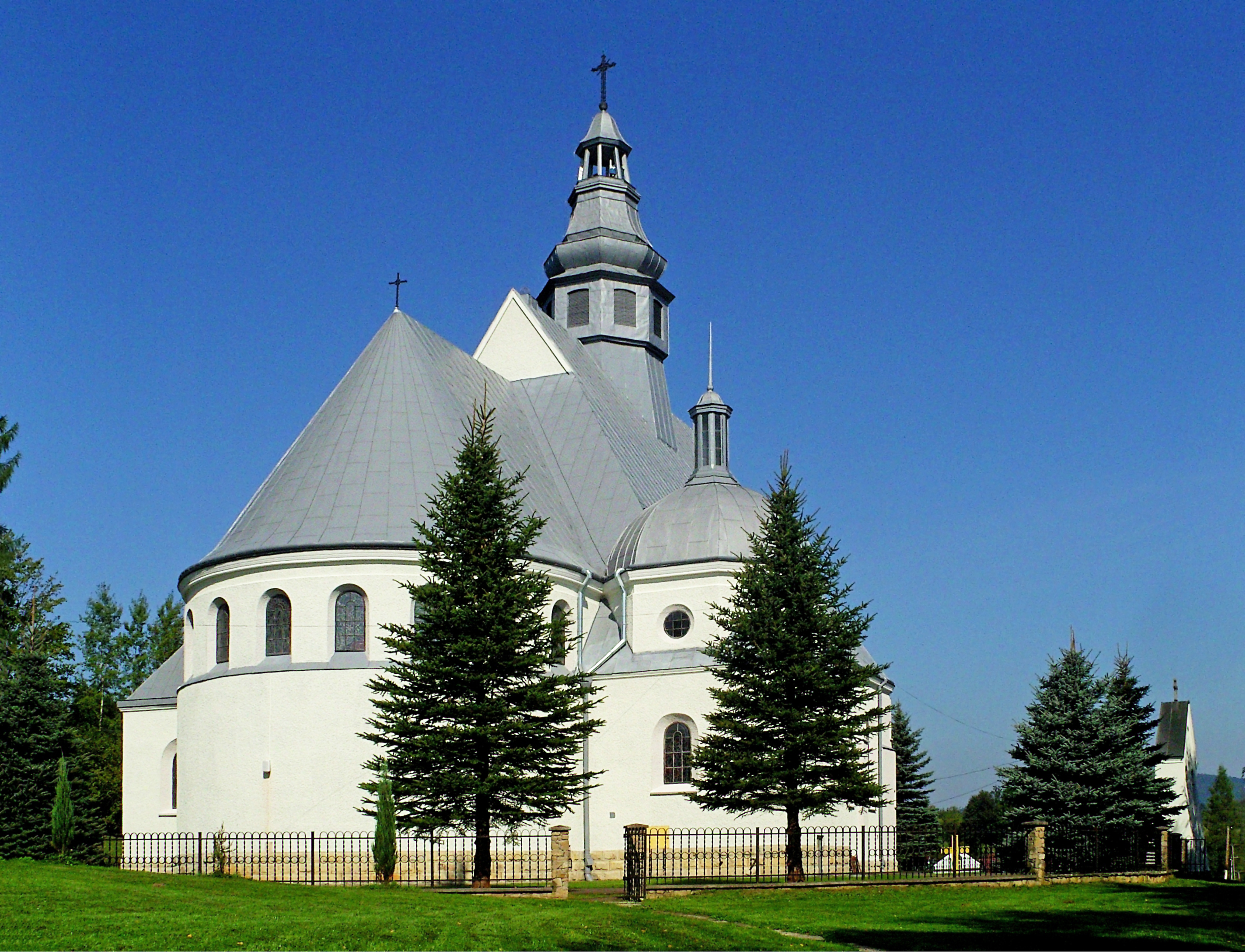 Kościół Imienia Maryi w Bączalu Dolnym (diecezja rzeszowska), wybudowany w stylu narodowym.